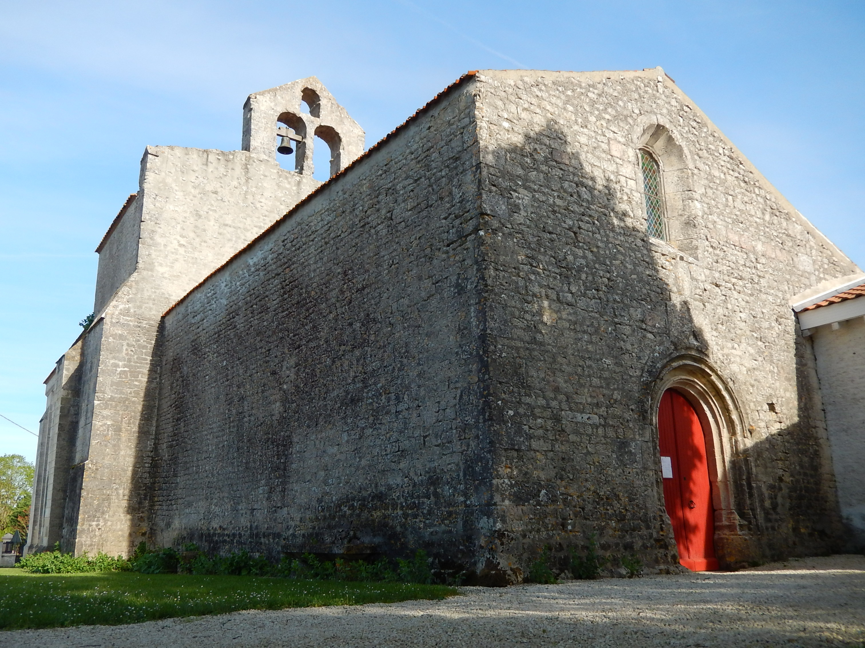 L'église Saint-Révérend de La Croix-Comtesse (Charente-Maritime, France). Façade ouest.